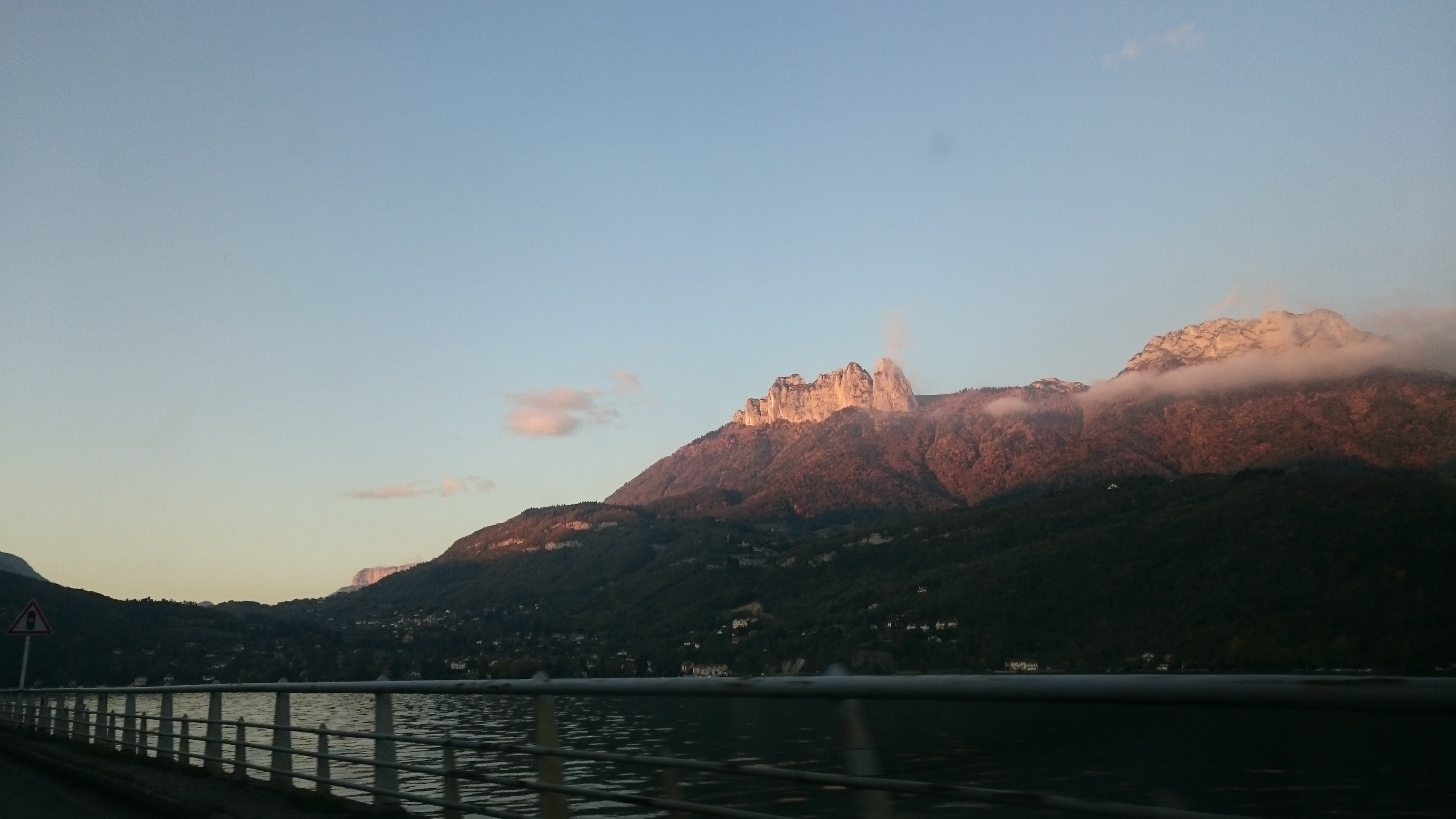 Vue sur le Parmelan de la Voie Verte du lac d'Annecy